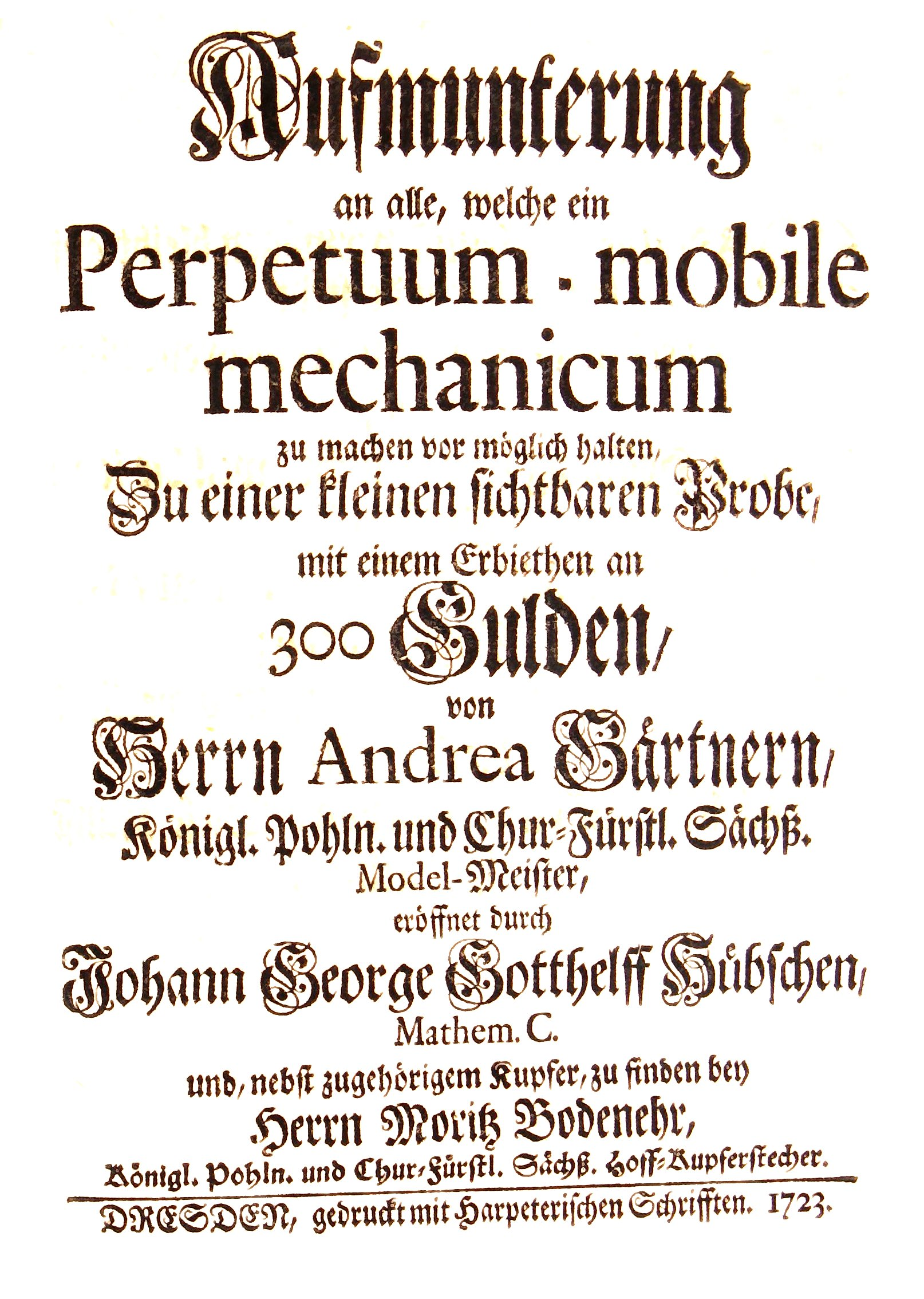 Strona tytułowa Aufmunterung an alle, welche ein perpetuum mobile mechanicum, zu machen vor möglich halten zu einer kleinen sichtbaren grobe mit einem Erbiethen an 300 gulden ... Andreasa Gärtnera